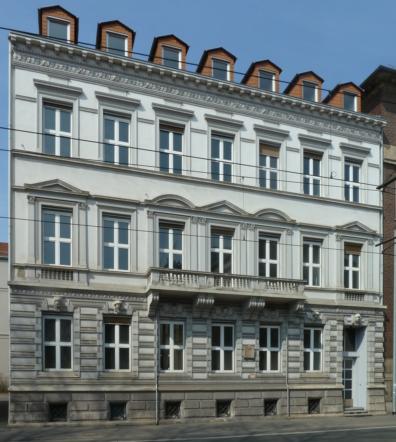 Geschäftshaus, Prinzenstraße 17, Hannover